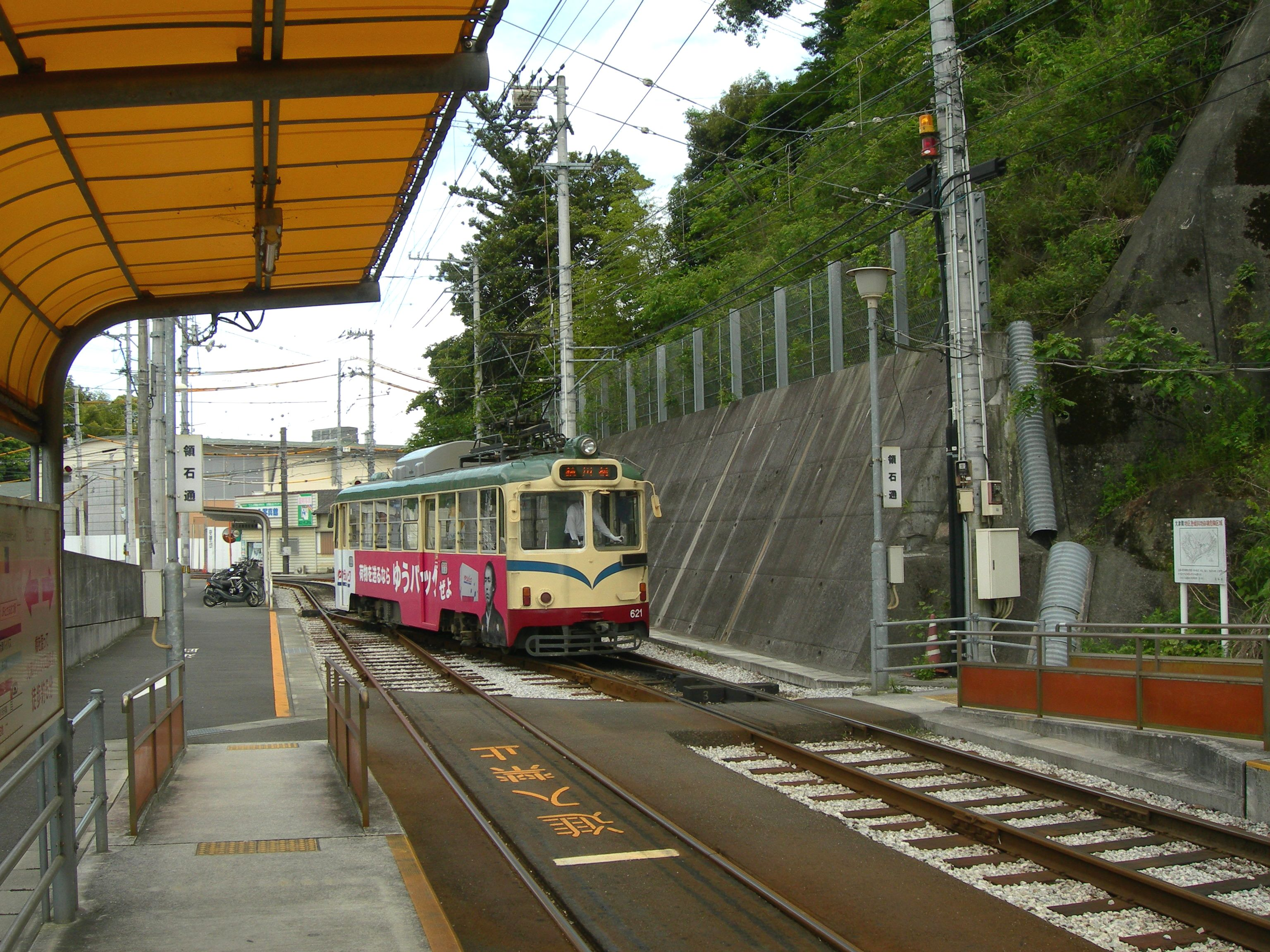 土佐電気鉄道・領石通電停、後免町方の渡り線